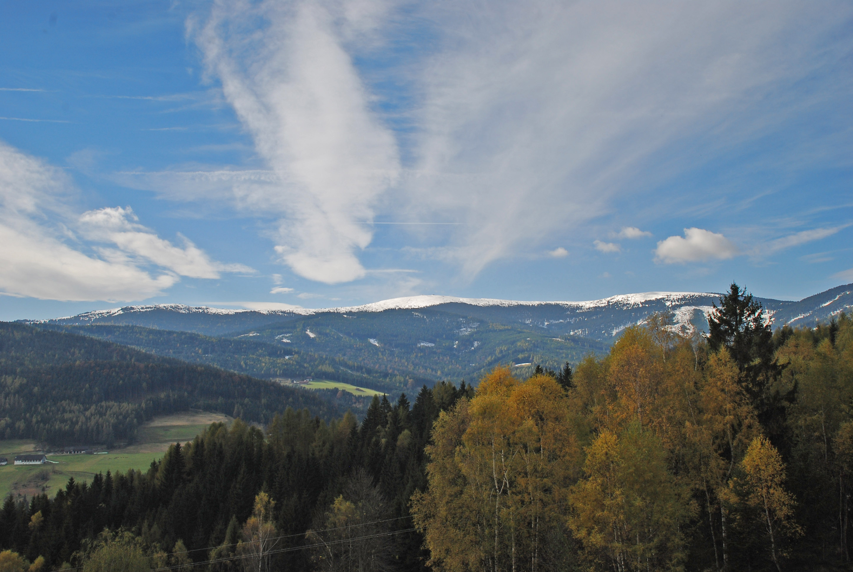 Handalm (links Glashüttenkogel mit Moseralm, rechts Weberkogel mit Wildbachalm) in der Koralpe in Osterwitz, Deutschlandsberg, Steiermark, Österreich. Im Vordergrund Wald in Kloster, links Bauernhof Fastlbauer in Osterwitz.